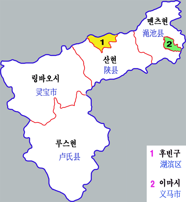 싼먼샤시 현급구역도